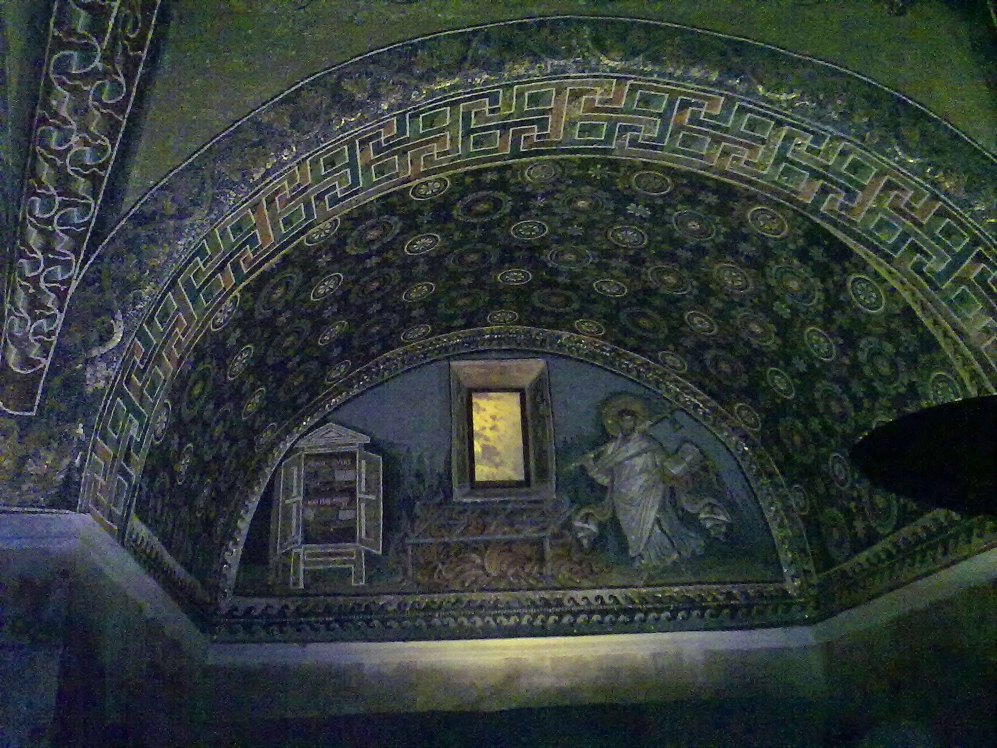 Mausoleo di Galla Placidia - MIBAC This is a photo of a monument which is part of cultural heritage of Italy.